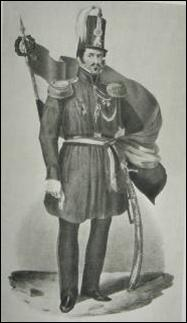 Emmanuel Van der Linden d'Hooghvorst, personnalité de la Révolution belge de 1830